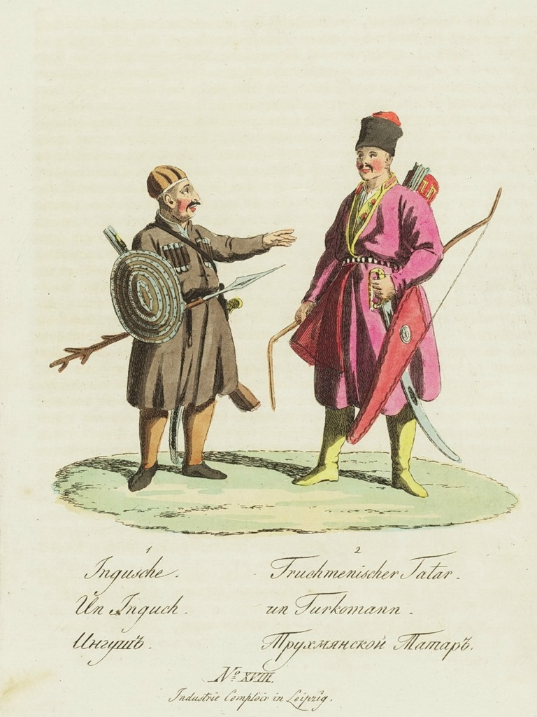 Ингуш (слева) и трухмянский татарин. Офорт с раскраской акварелью